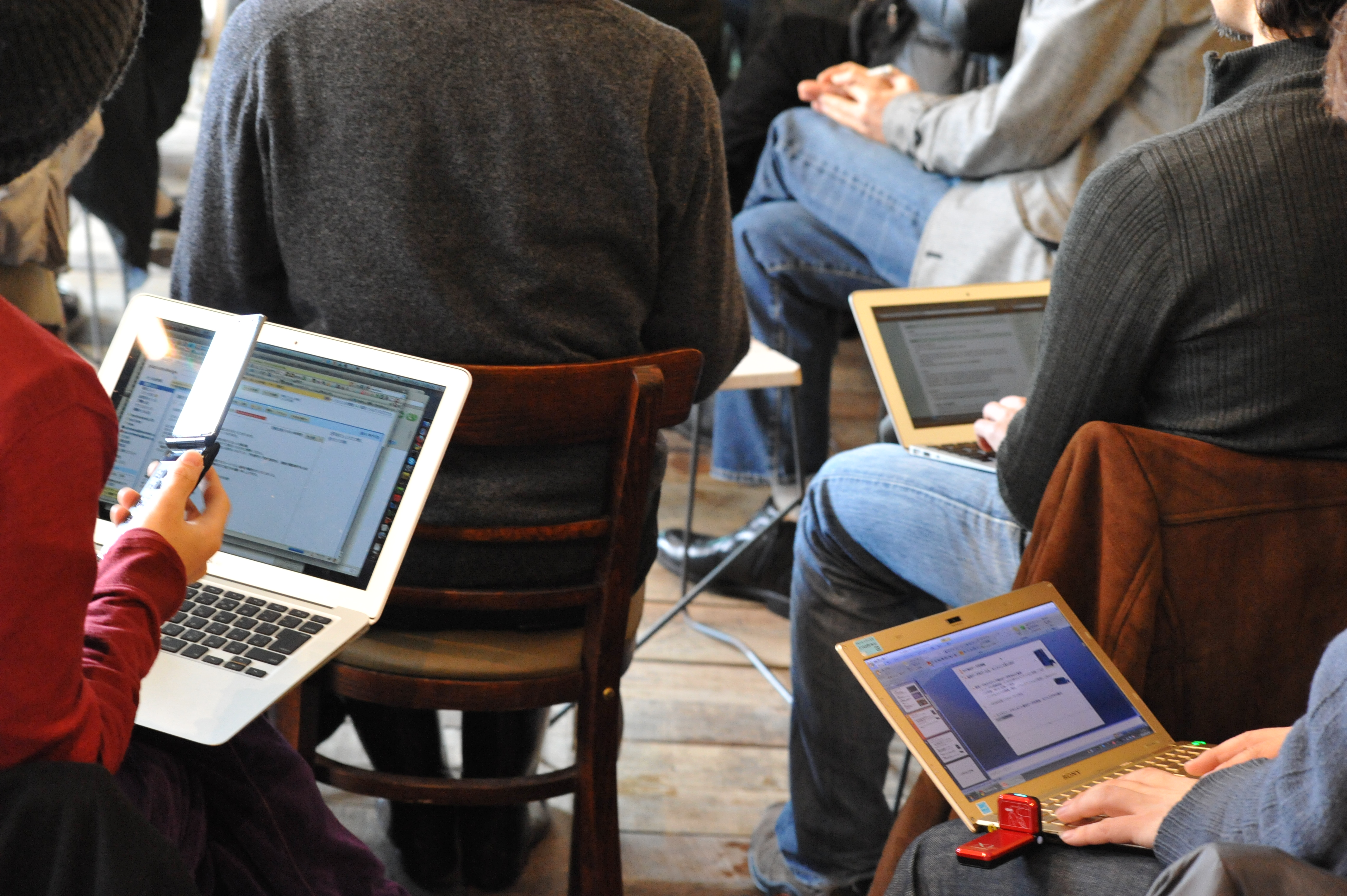 膝を交えてワキワキと